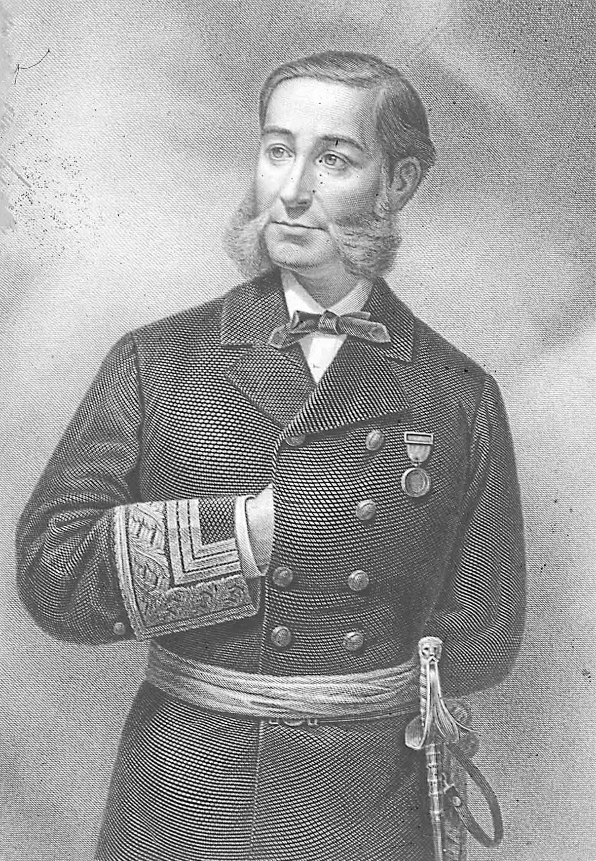 Retrato de Casto Méndez Núñez